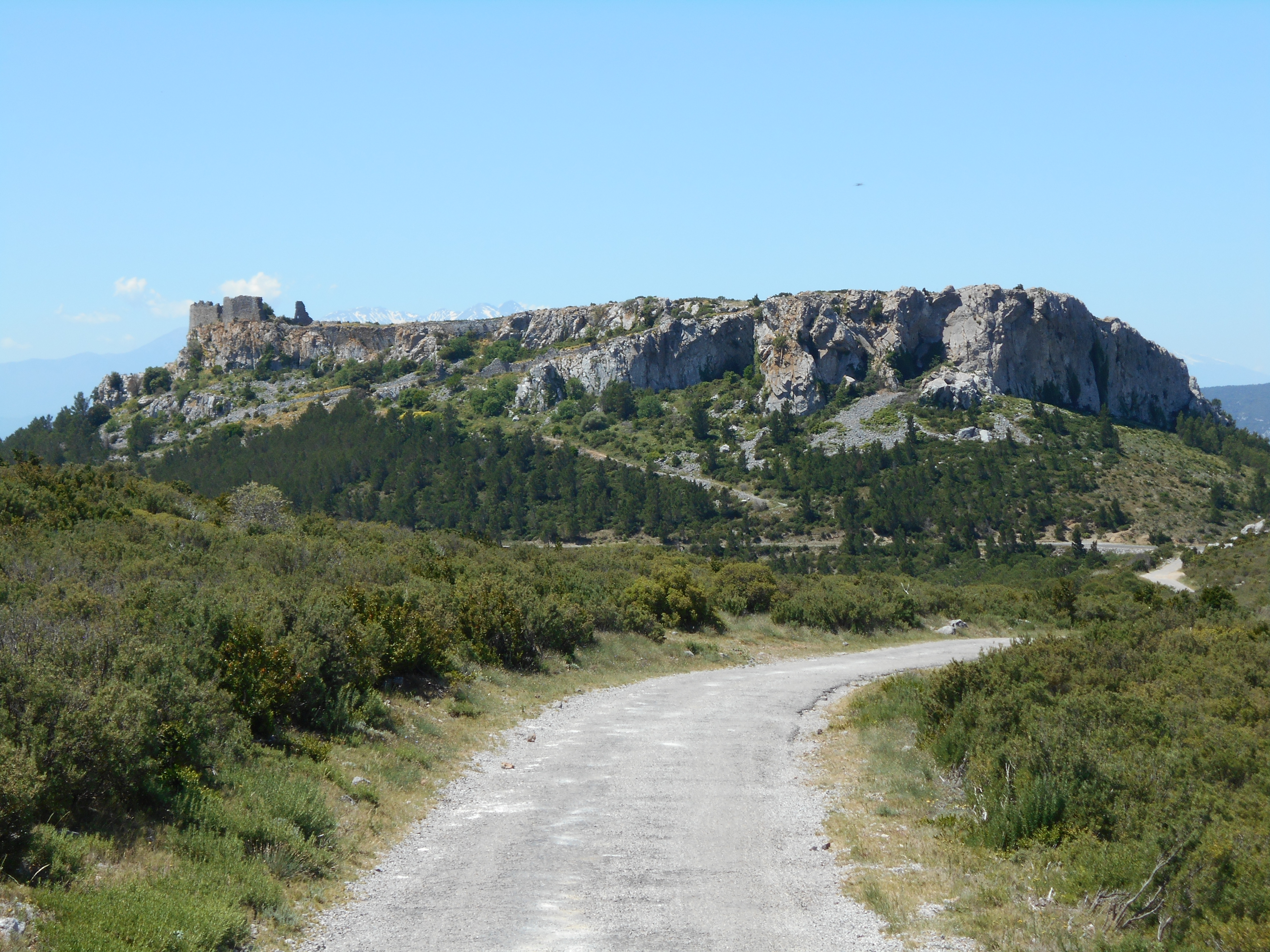 Plataforma on es trobava la Vila Reial de Salvaterra, a la dreta, a la foto, de les restes del castell.